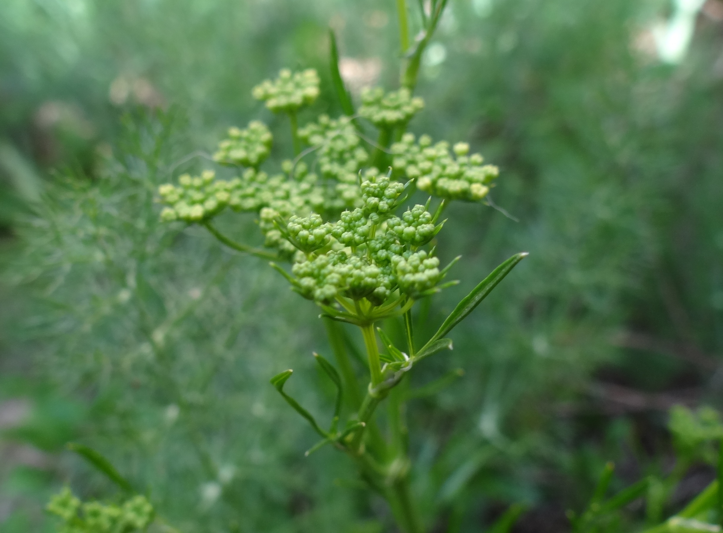 Flores de hinojo (Foeniculum vulgare)